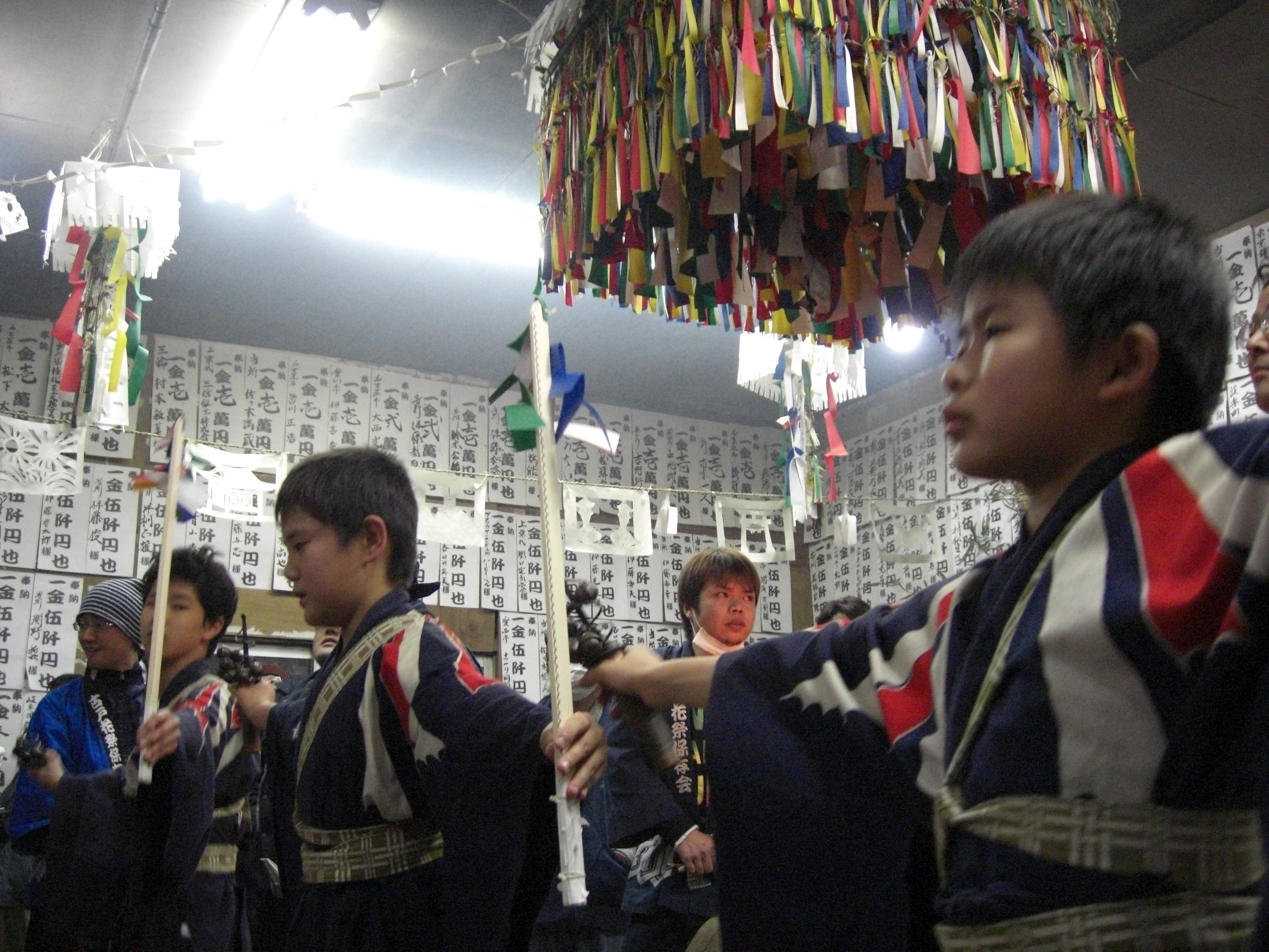 愛知県北設楽郡東栄町古戸で行われている花祭（霜月神楽）。「三つ舞（やち）」。